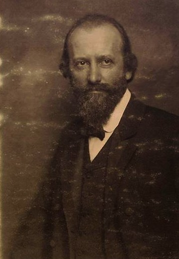 rakouský pedagog, malíř a politik Josef Sturm